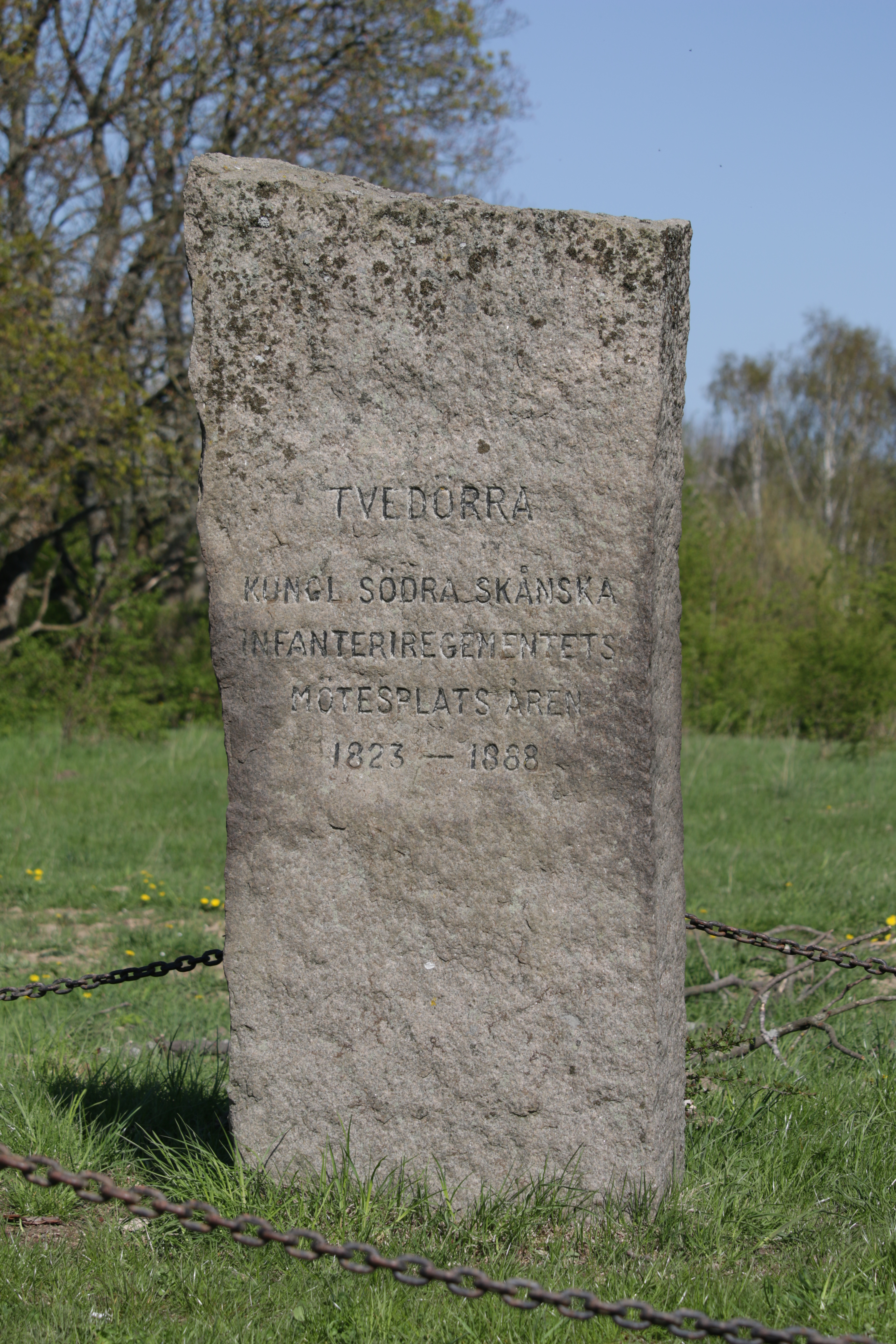 Minnessten på Tveöra hed